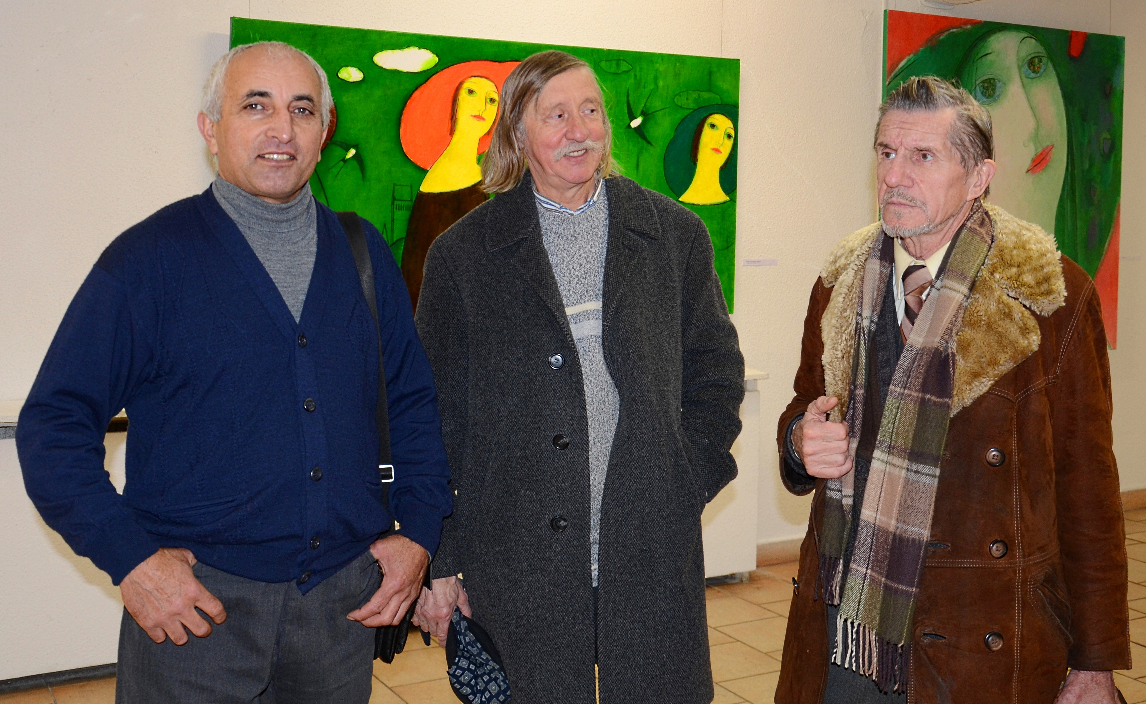 Открытие персональной выставки живописи белорусского живописца Василия Костюченко в минском Музее современного изобразительного искусства. Белорусские художники Спартак Арутюнян, Семён Доморад.